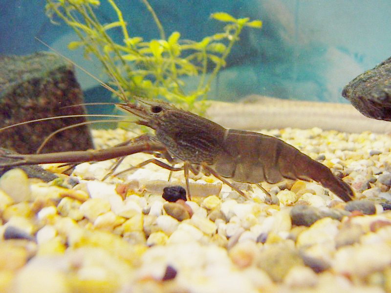 Macrobrachium japonicum(ヒラテテナガエビ), Female(メス)